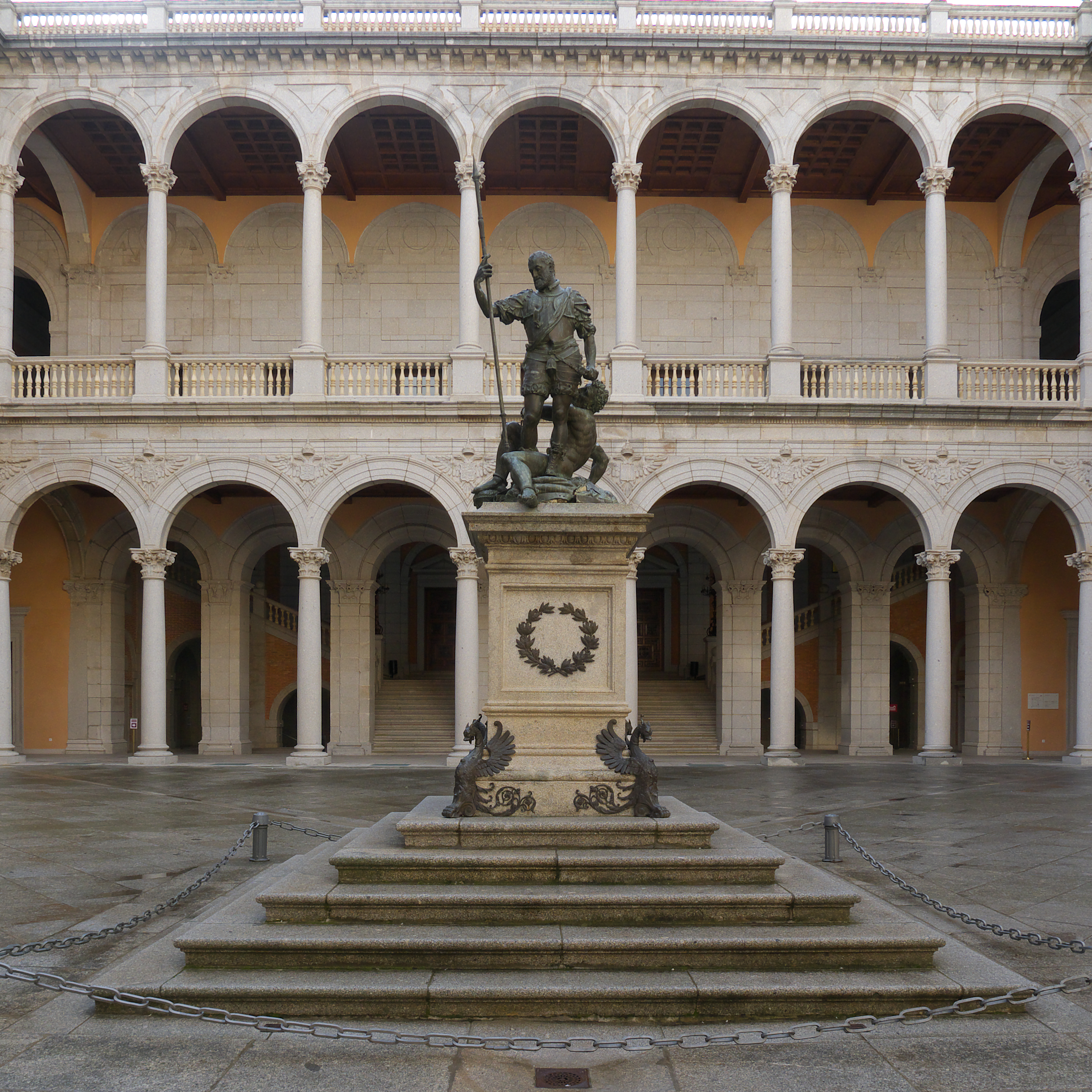 El Emperador Carlos V contrata a los Leoni, Leone u su hijo Pompeo, una escultura en bronce por su victoria sobre el poder turco (1553). Los renacentistas escultores entregan Carlos V dominando el Furor, actualmente en el Museo del Prado y en otras fechas presidiendo este patio.